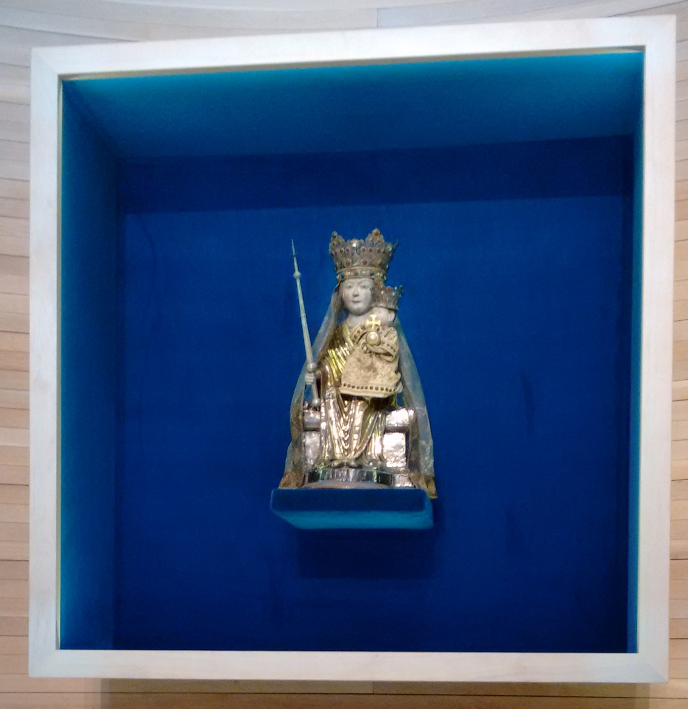 Marienstatue in Wietmarschen